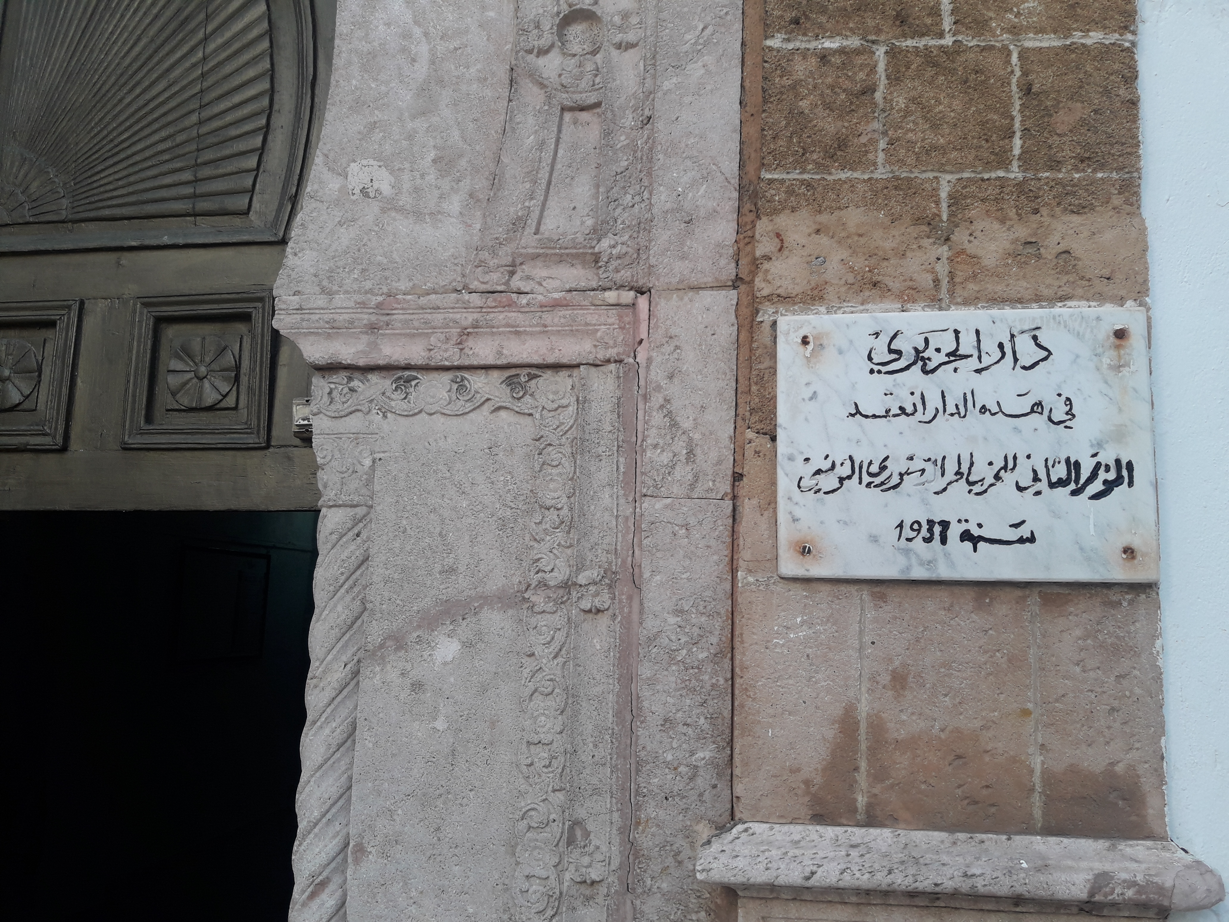 Dar El Jaziri aka Poetry house